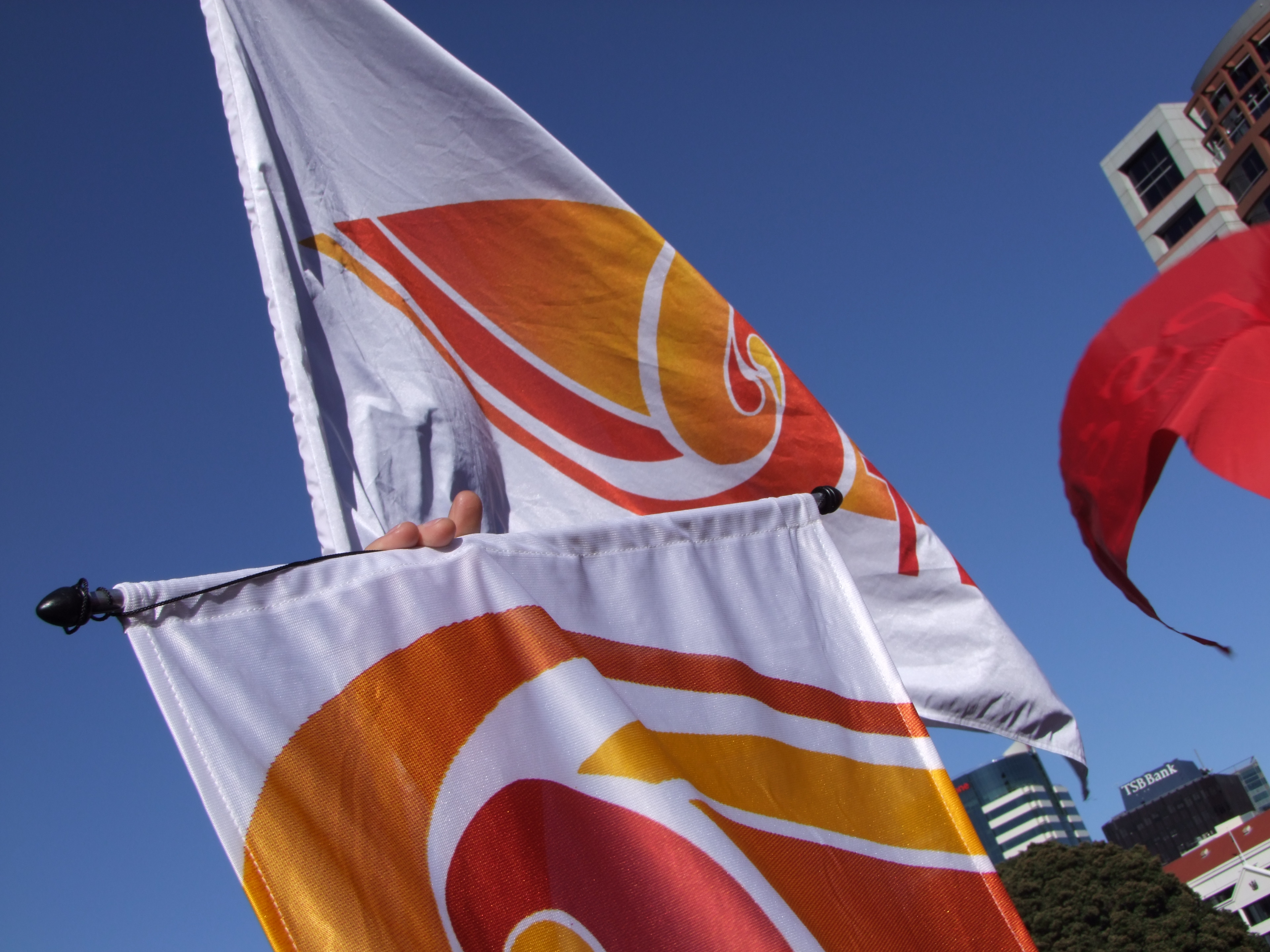 TEU flags